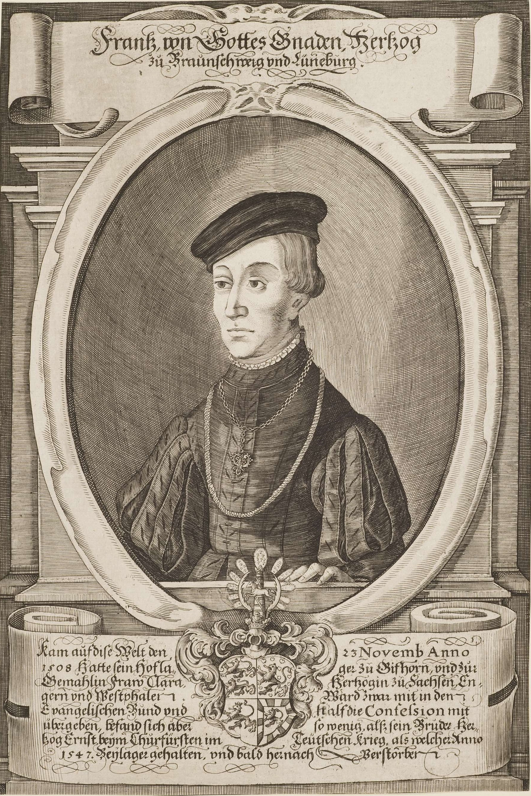 Zeichnug von Herzog Franz von Braunschweig und Lüneburg Francis, Duke of Brunswick and Lüneburg